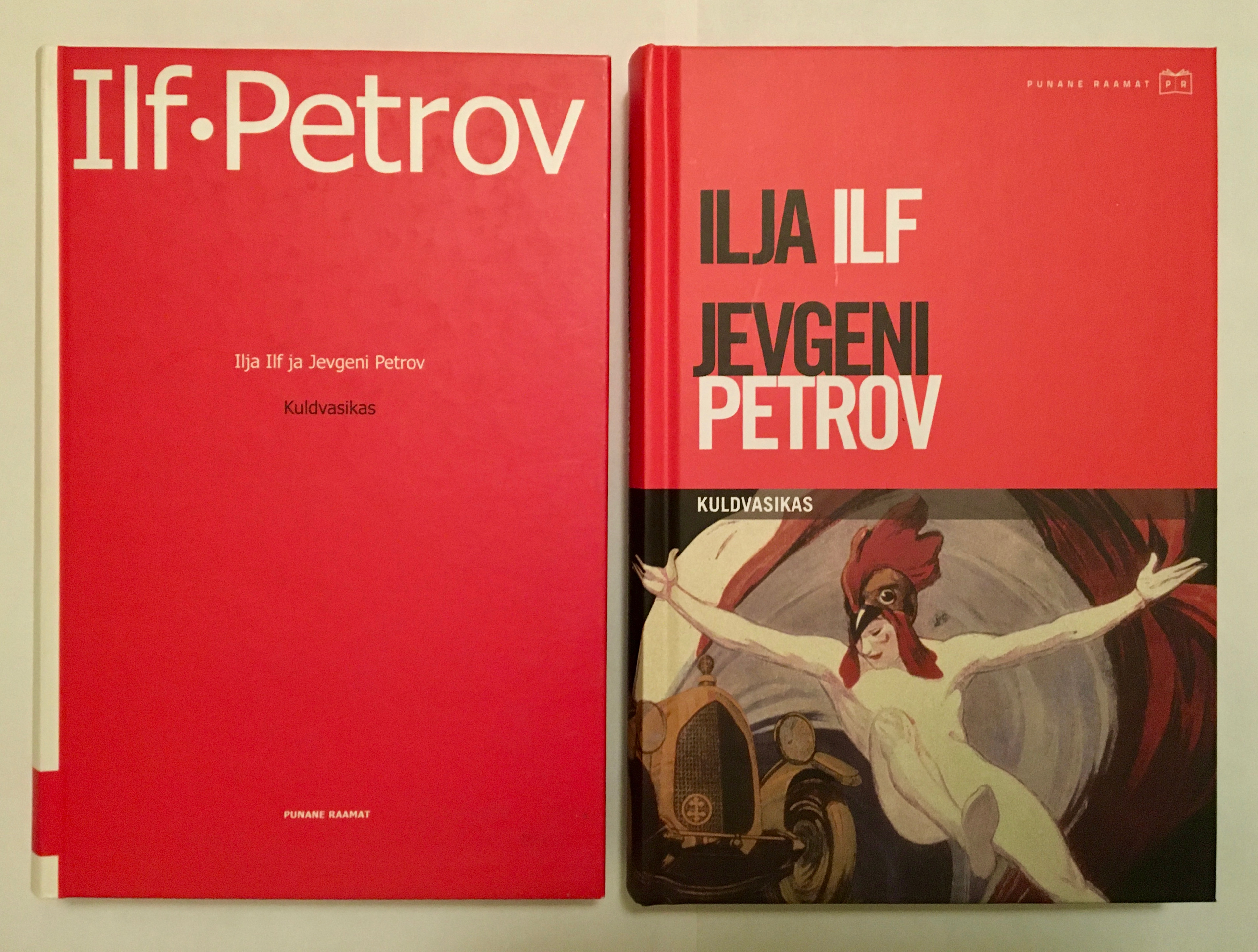 Teine ja kolmas kujundus